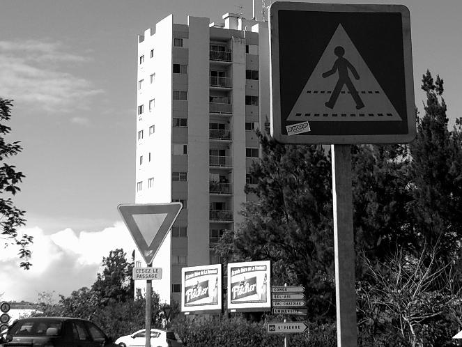 Divers panneaux de signalisation routière à un rond-point près de la Tour des Azalées sur la commune du Tampon (Île de La Réunion).